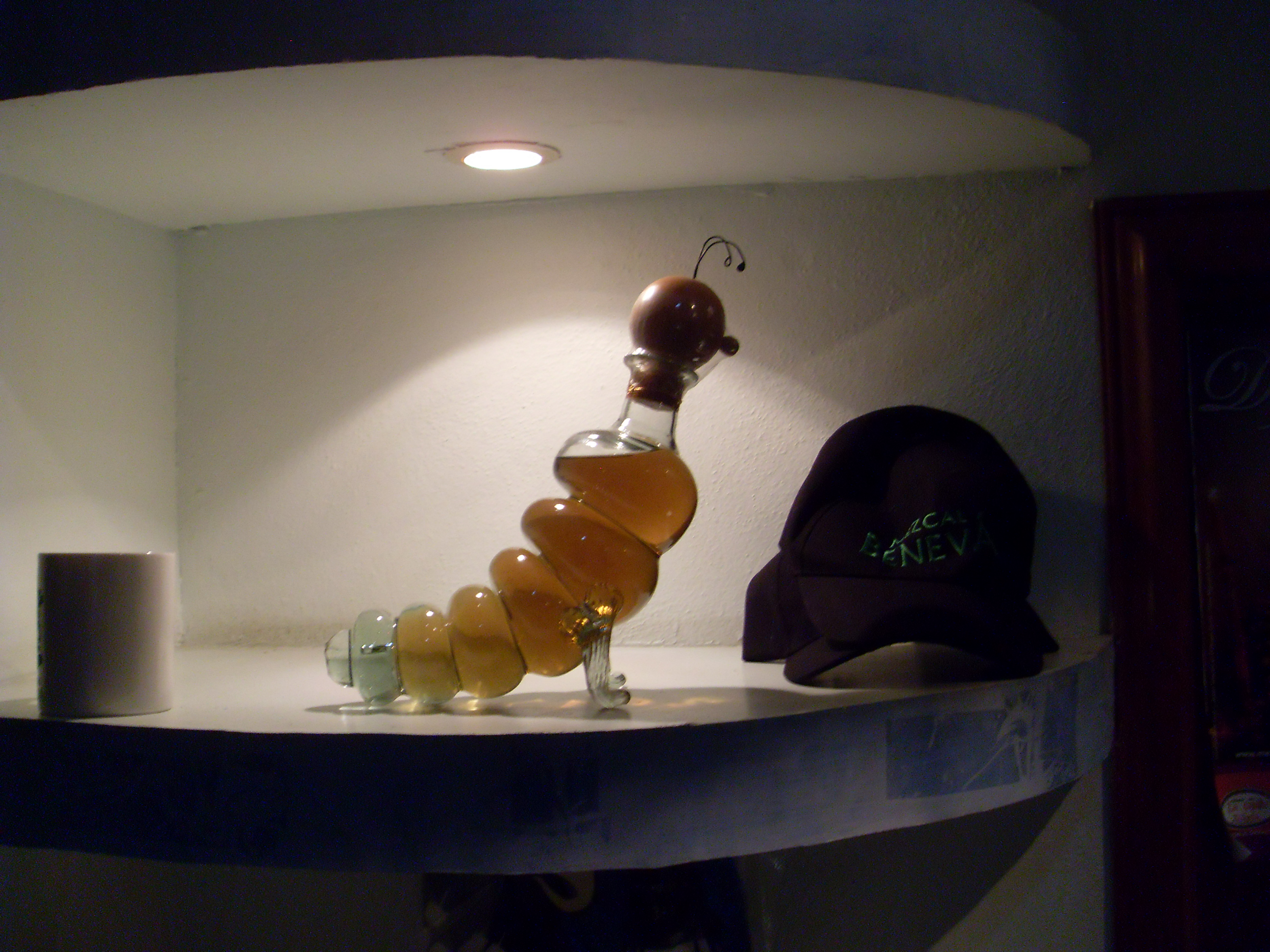 Ozdobna butelka w formie gąsieniczki "gusano" wkładanej do mezcalu. Meksyk